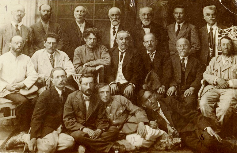 חבורת סופרים עברים לפני צאתם מרוסיה. דפס כסף מקורי מתצלום קבוצתי של חבורת הסופרים העברים שהותרה יציאתם מרוסיה הסובייטית בשנת 1921, ובראשם ח"נ ביאליק. מרבית המצולמים היו חברים בוועד הוצאת "דביר" שנוסדה סמוך לאותו זמן. תצלום זה נעשה למזכרת בעיר אודיסה, בטרם יצאו את גבולות רוסיה. בגב התצלום הוטבעה חותמת האגודה: "למען הספריה הלאמית והאוניברסיטאית בירושלים, קישינוב" בתוספת ההערה כי תצלום זה נתרם לבית הספרים הלאומי, כנראה באמצע שנות העשרים של המאה העשרים, על ידי יולי גרינברג, קישינב. עוד נוספו בגב התצלום, שמותיהם של כל המצולמים.